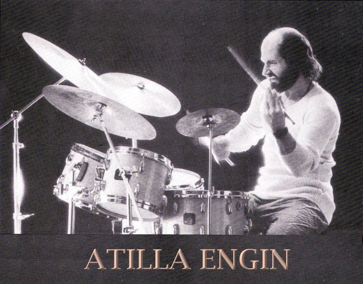 Atilla Engin'in arşivinden